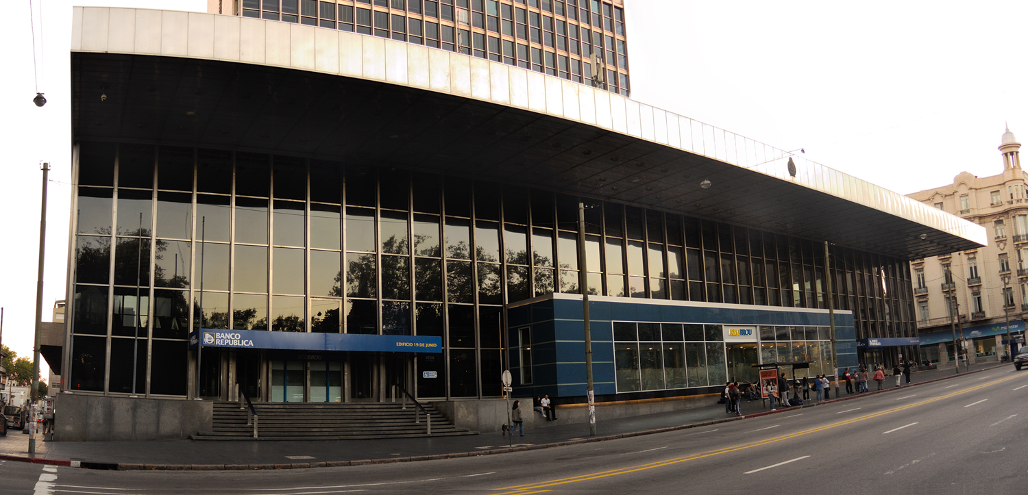 Sucursal 19 de Junio del Banco de la República Oriental del Uruguay, en Montevideo, Uruguay.